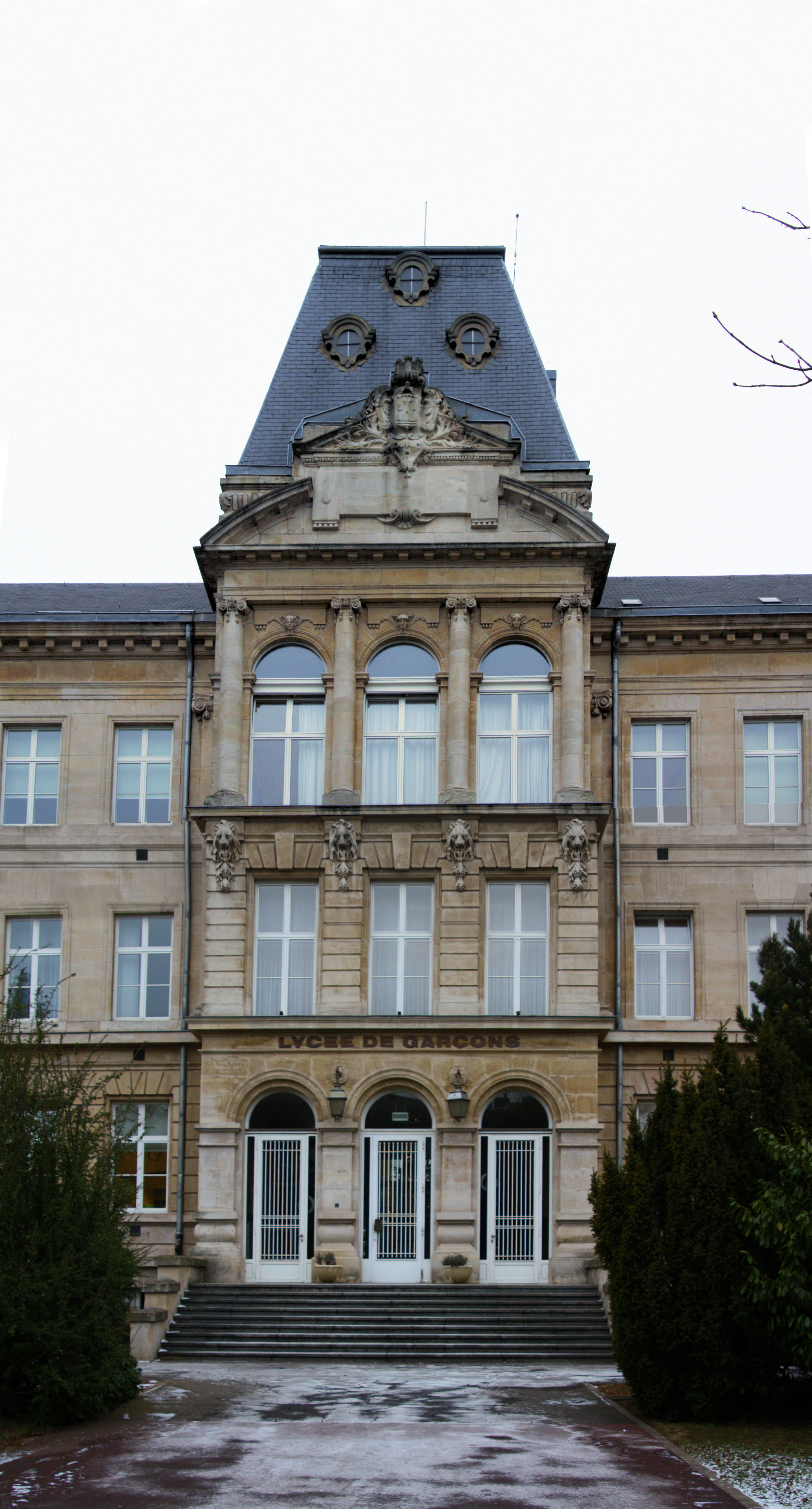 Déi al Entrée vum Jongelycée zu Esch-Uelzecht Architekt: Paul Flesch (1870-1955) Auteur: Oennenzopp Source: Selwer gemach, zesummegesaat aus 3 eenzelne Fotoen Datum: 7.1.2009 Kategorie:Esch-Uelzecht Kategorie:Schoulen zu Lëtzebuerg